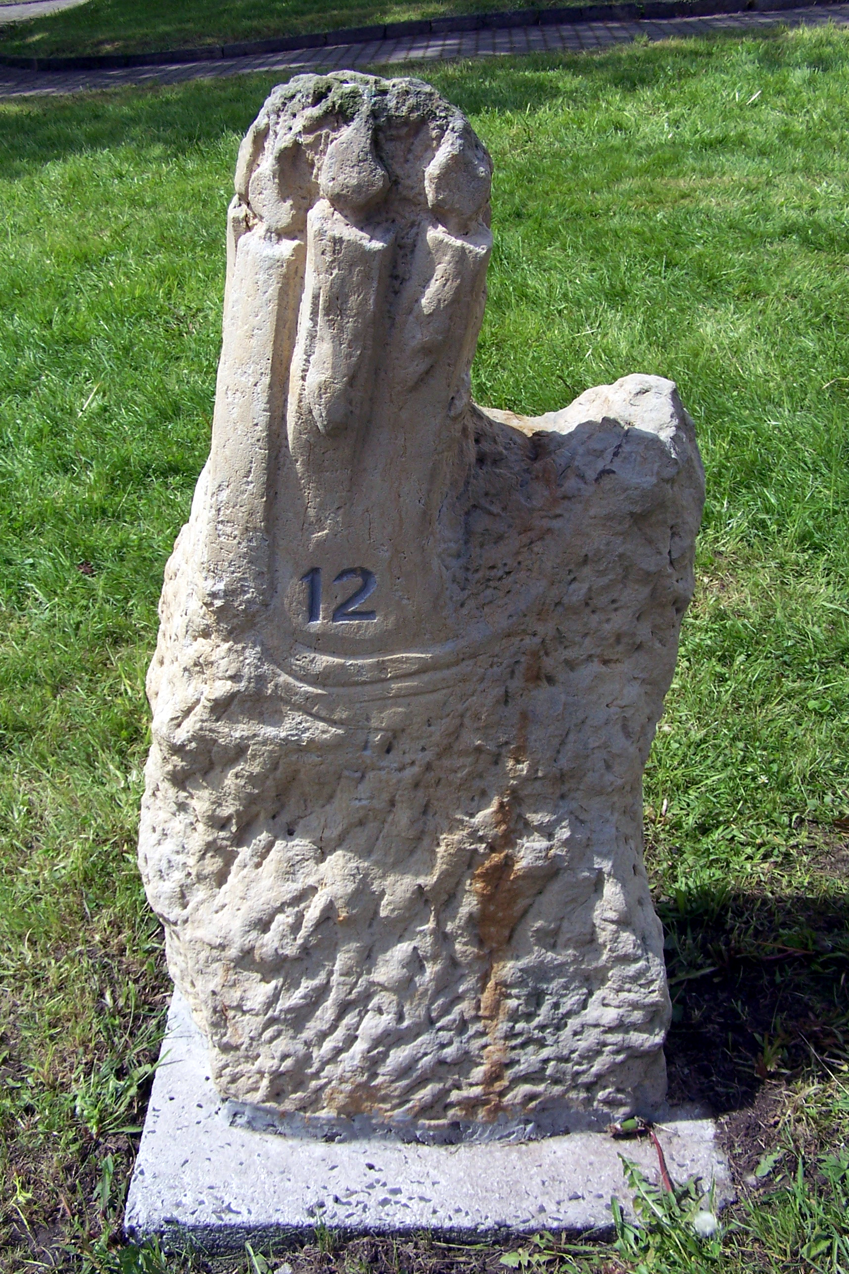 Křížová cesta ke svobodě – 12 – svíce